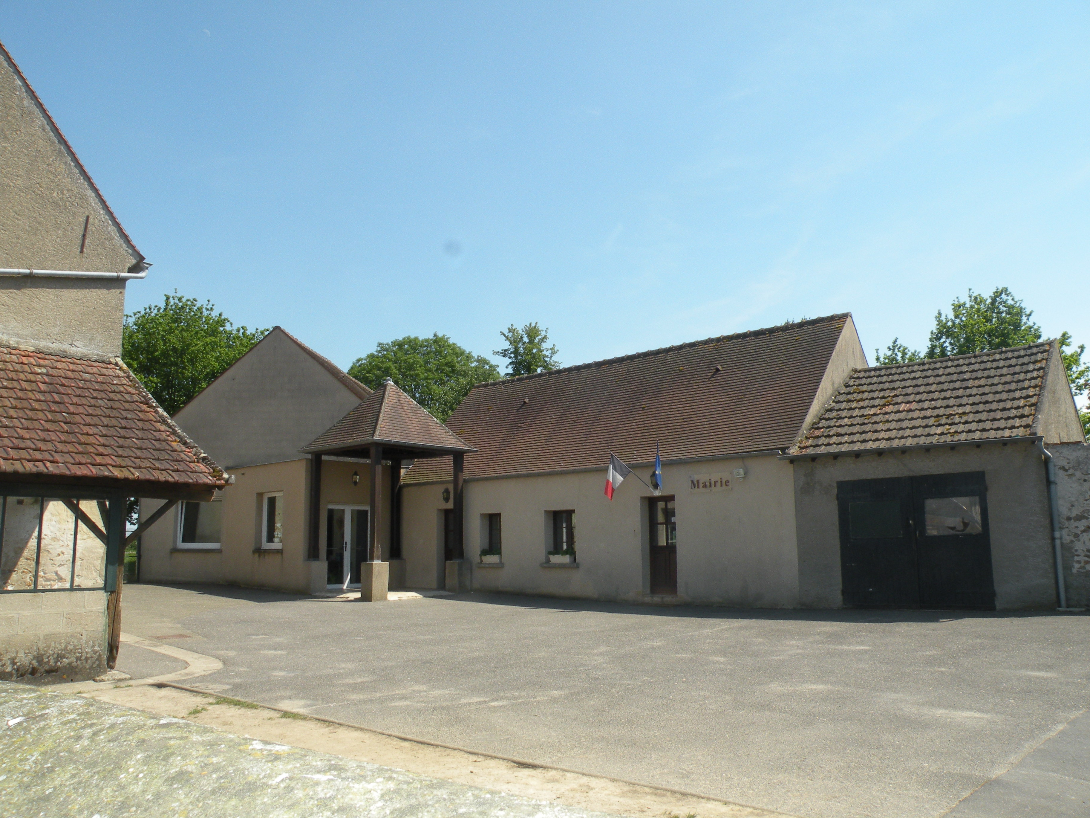 mairie Le Heaulme